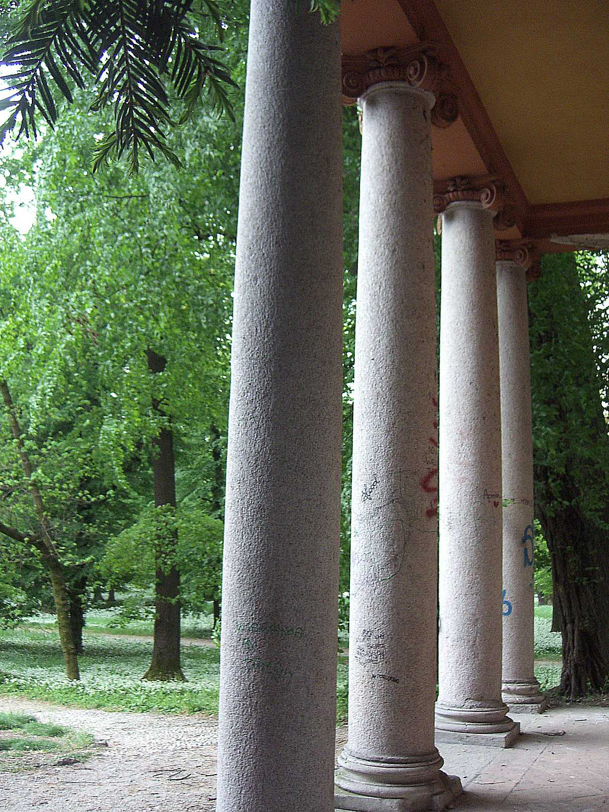 MB Monza Giardini della Villa Reale il colonnato del pronao del tempietto dorico